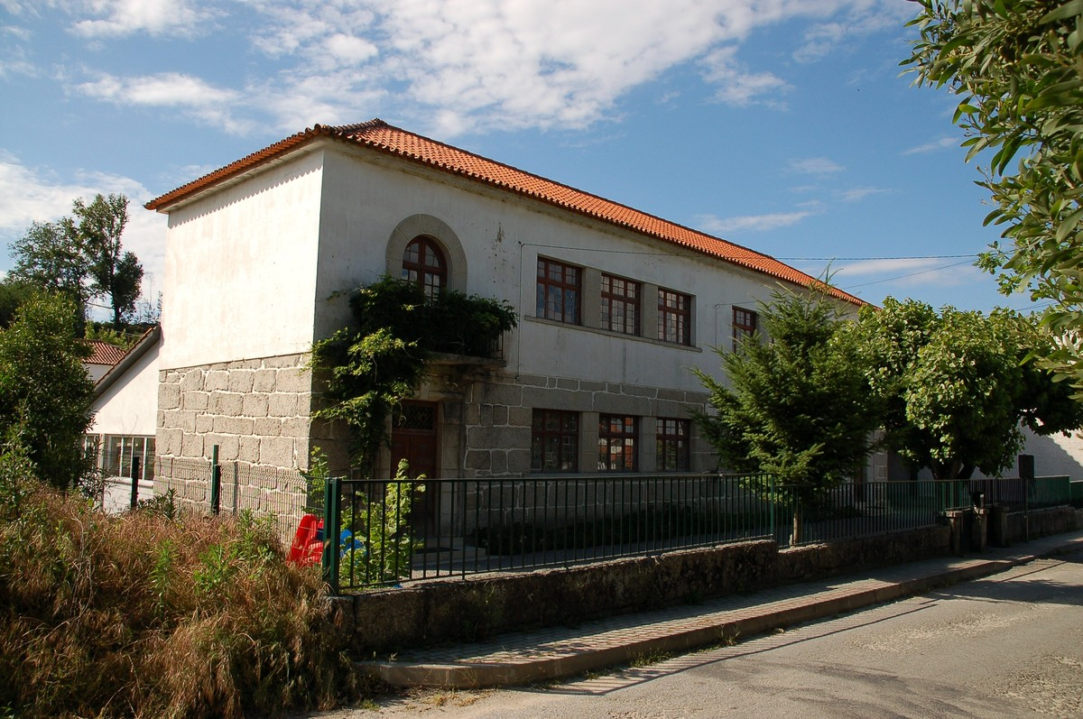 Escola Básica do 1º Ciclo de Treixedo